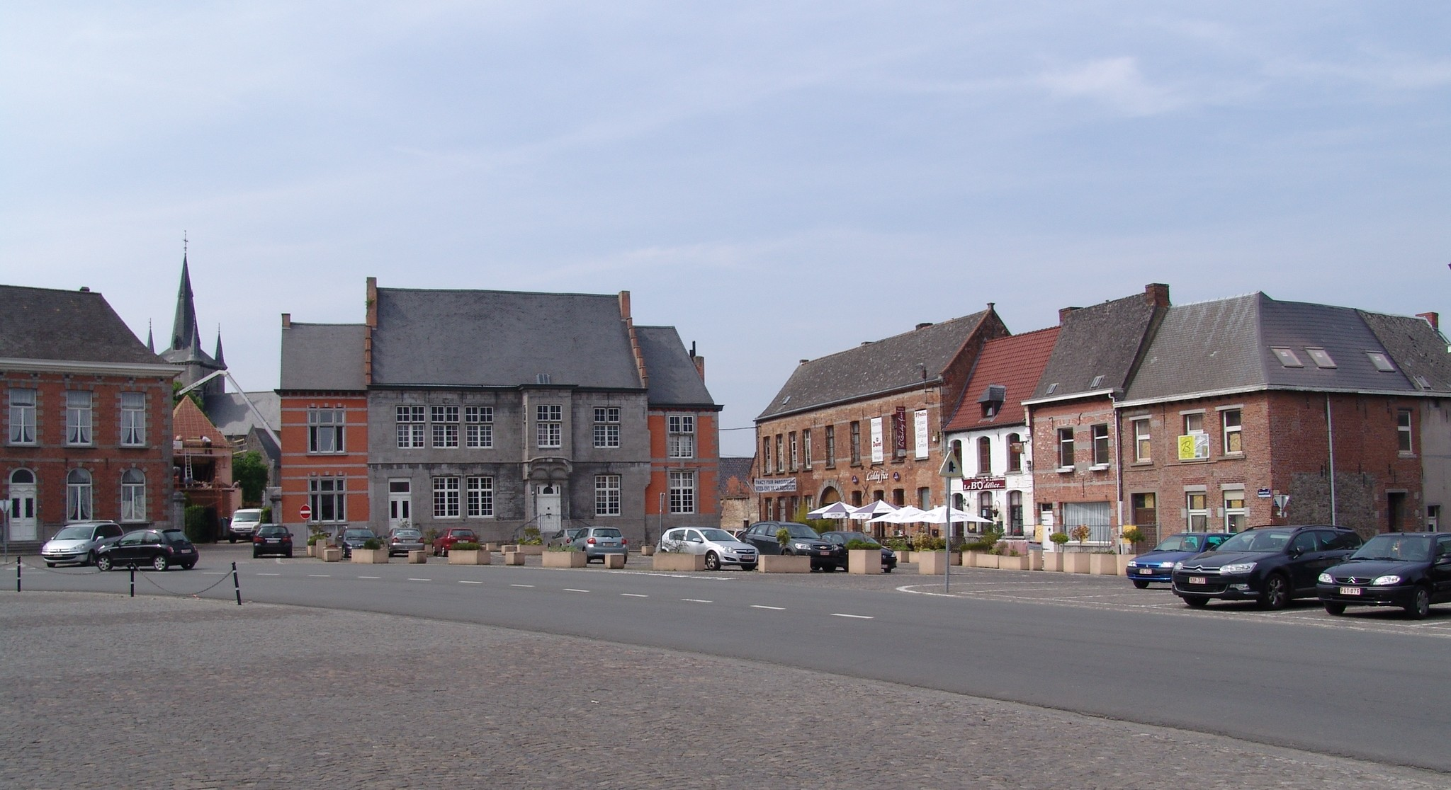 Grote Markt van Chièvres